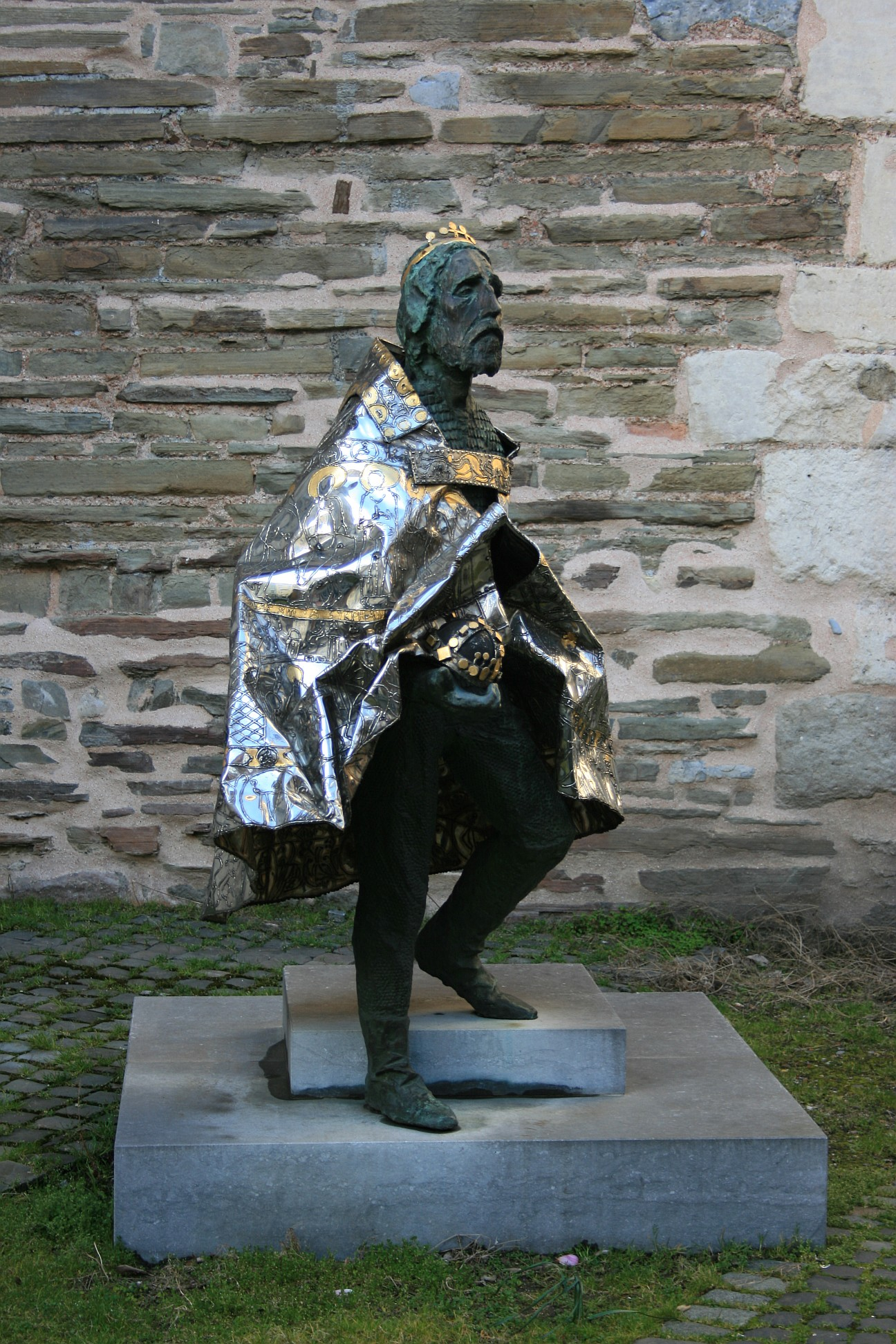 Statue des St. Stephanus, am Münsterplatz in Aachen. Gestiftet von ungarischen Pilgern anlässlich der Aachener Heiligtumsfahrt von 1993. Bronzefigur stellt den ungarischen König und Nationalheiligen Stephan I. dar